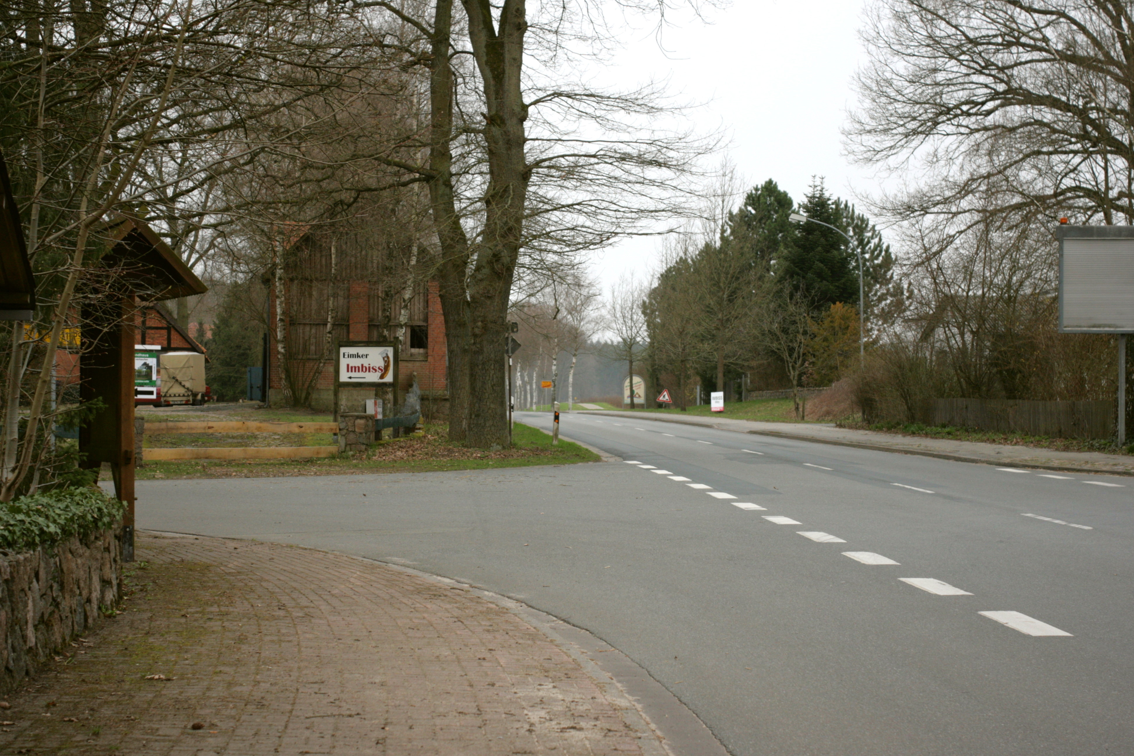 Salzweder Straße in Eimke